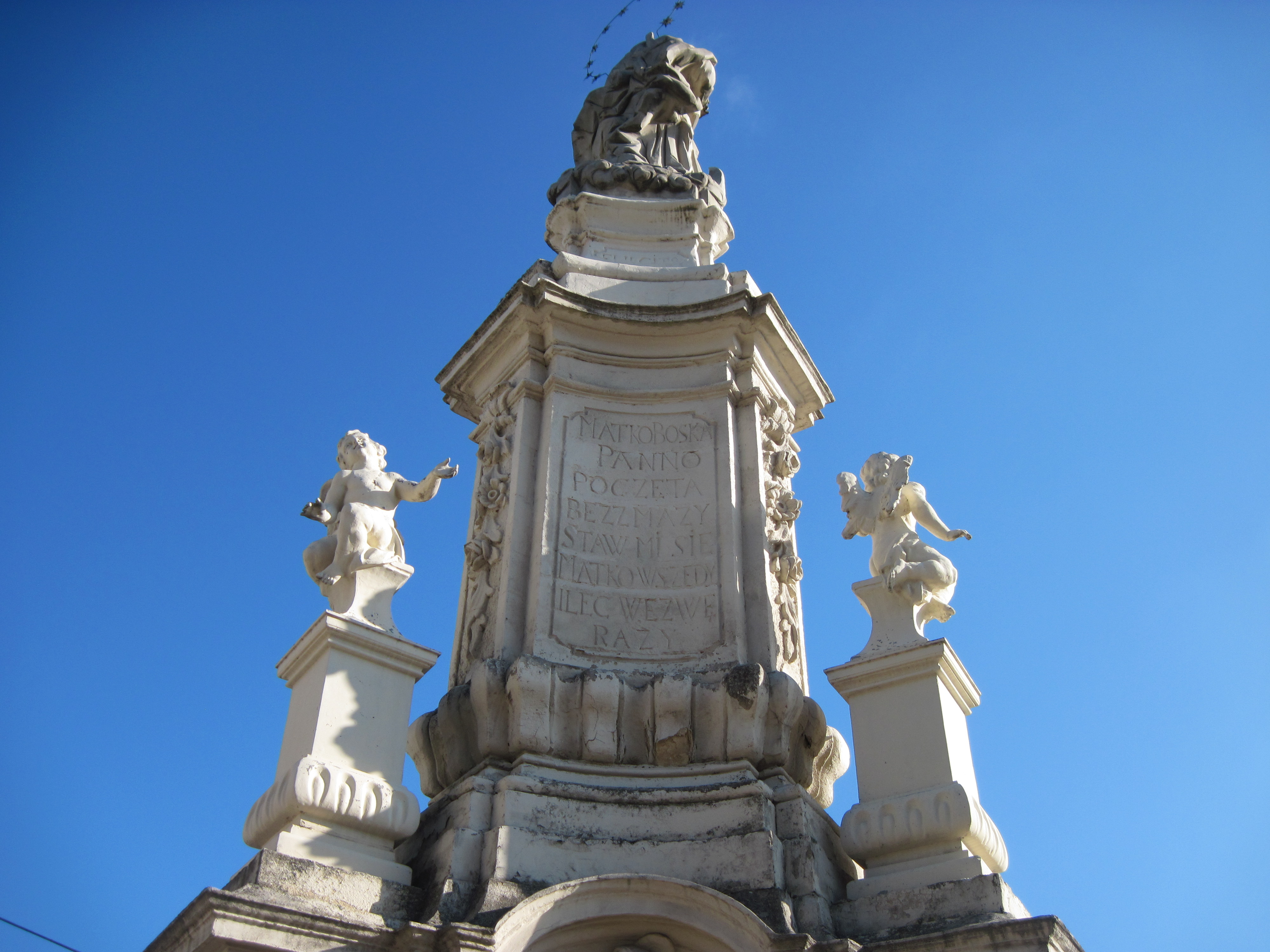 Придорожній пам'ятник Непорочного Зачаття Пресвятої Діви Марії, Бучач, 2015